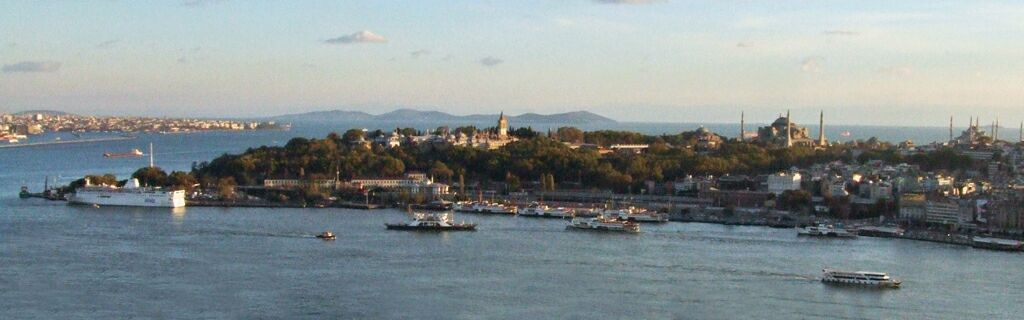 Golden_Horn_and_Sultanahmet